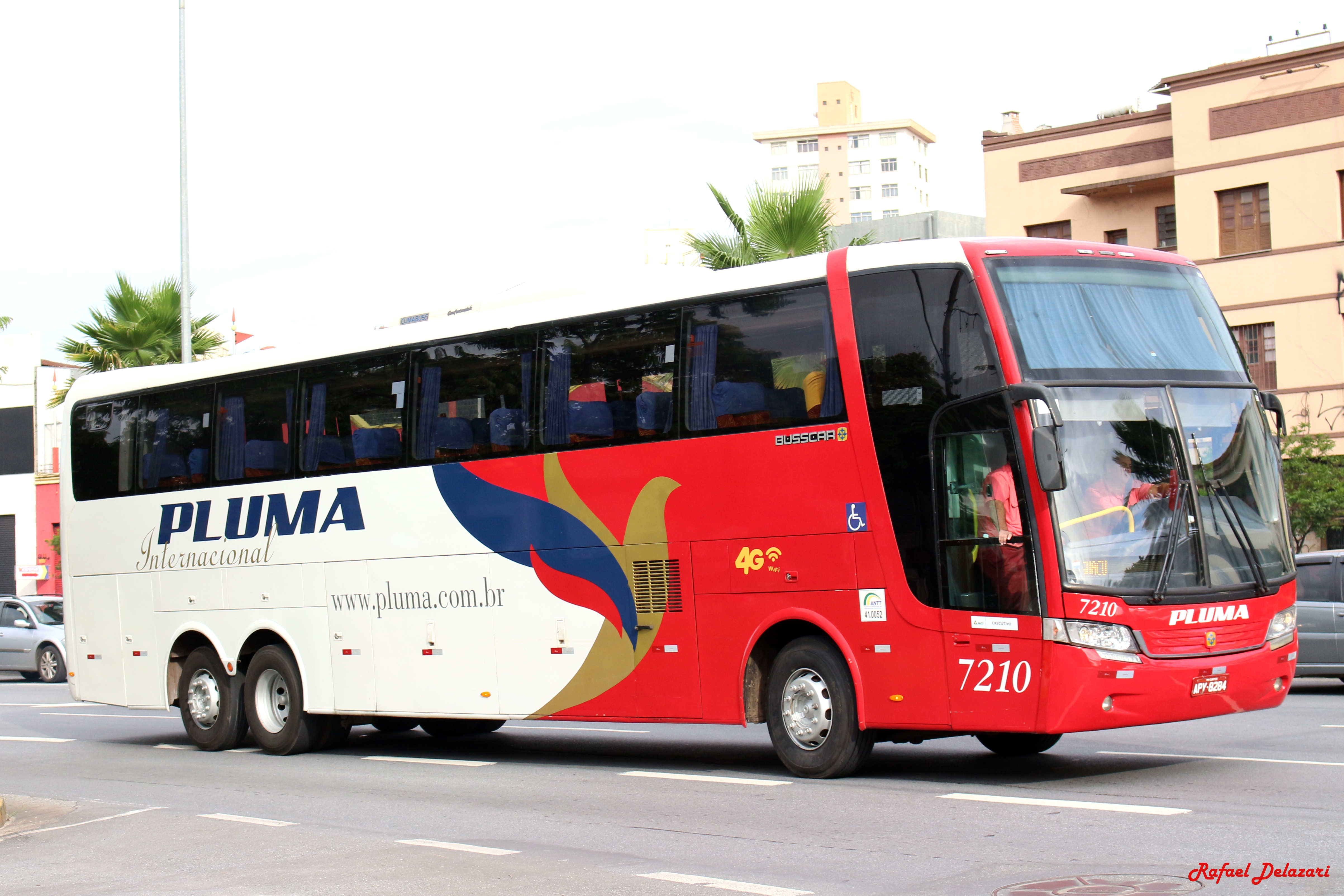 Pluma - 7210